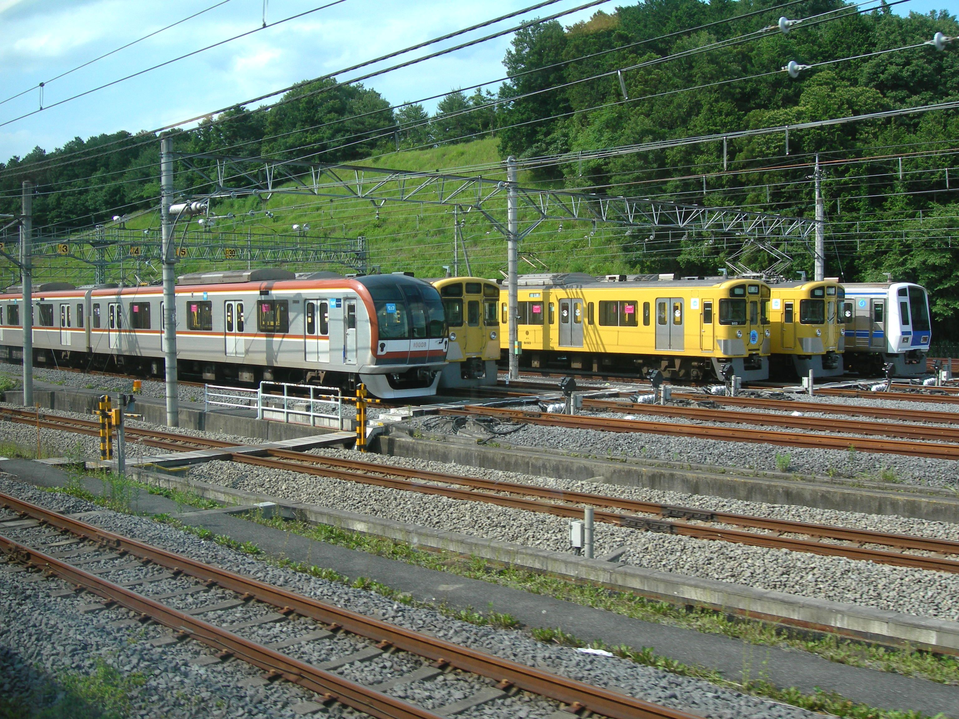 西武鉄道 武蔵丘車両基地